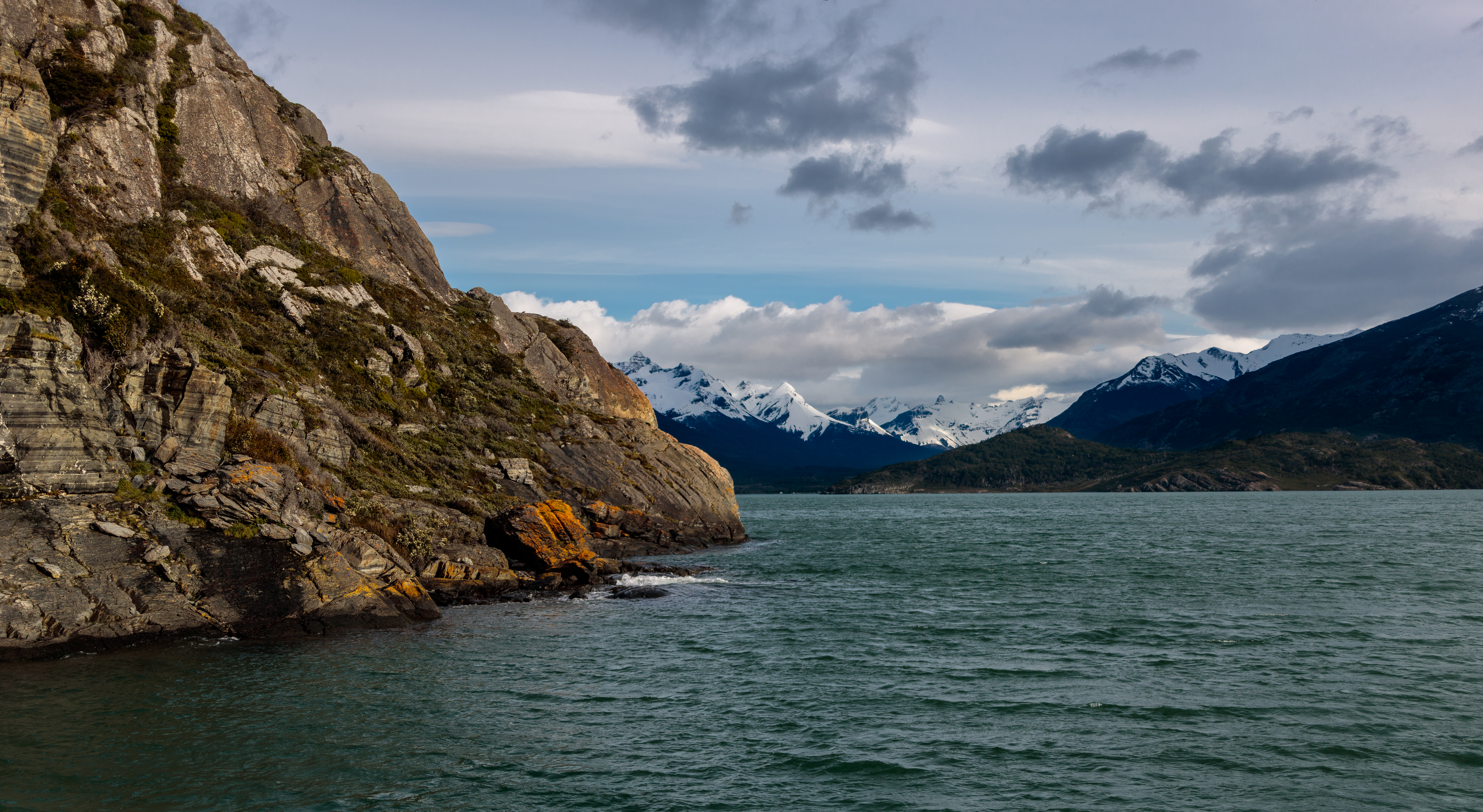 Parque nacional Bernardo O'Higgins